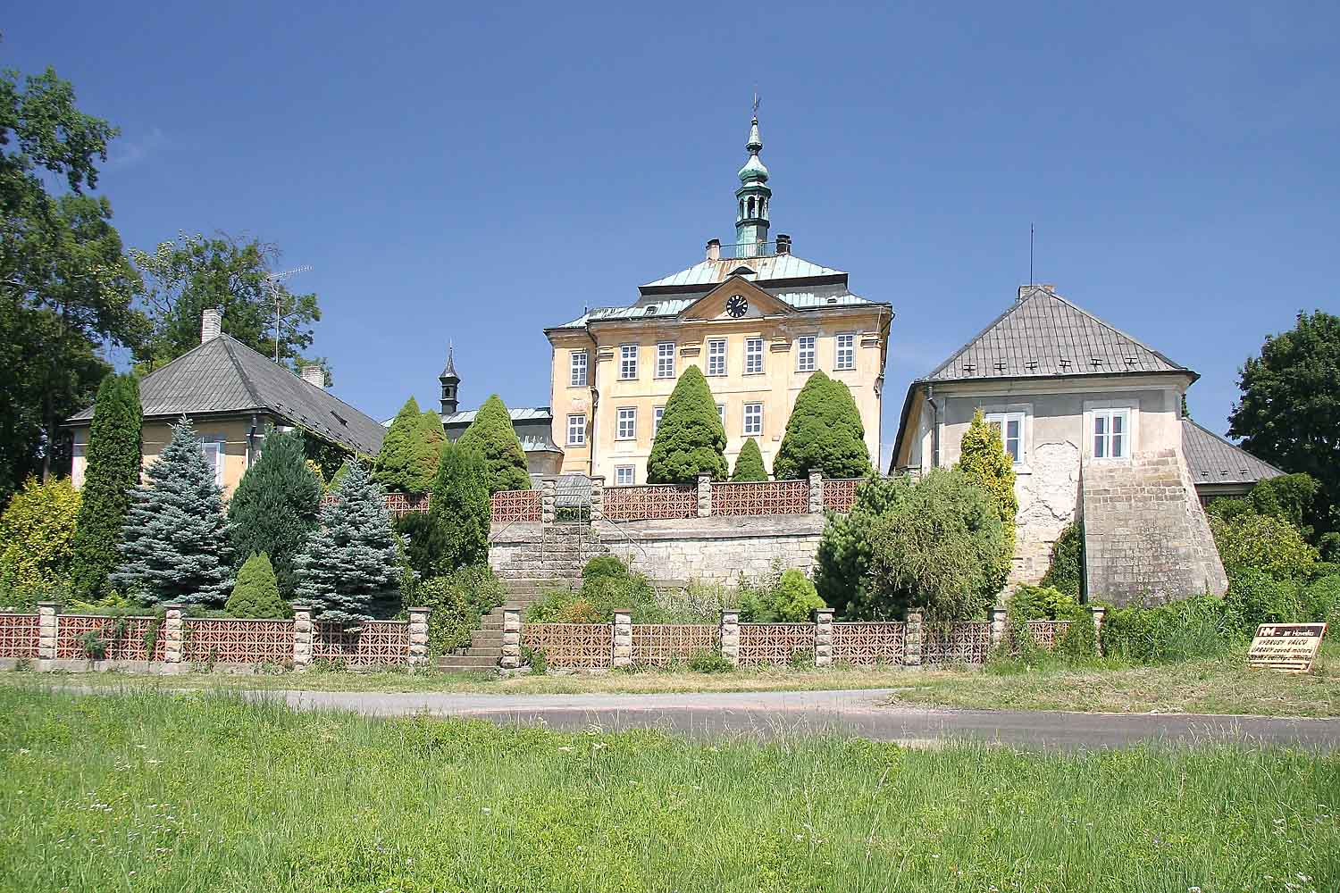 Jičíněves - zámek, district Jičín, region Hradec Králové, Czech Republic autor: Prazak date: 20. 7. 2006